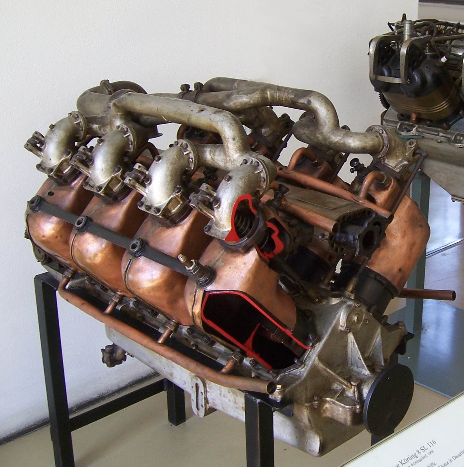 Körting 8 SL 116 in der Flugwerft Schleißheim